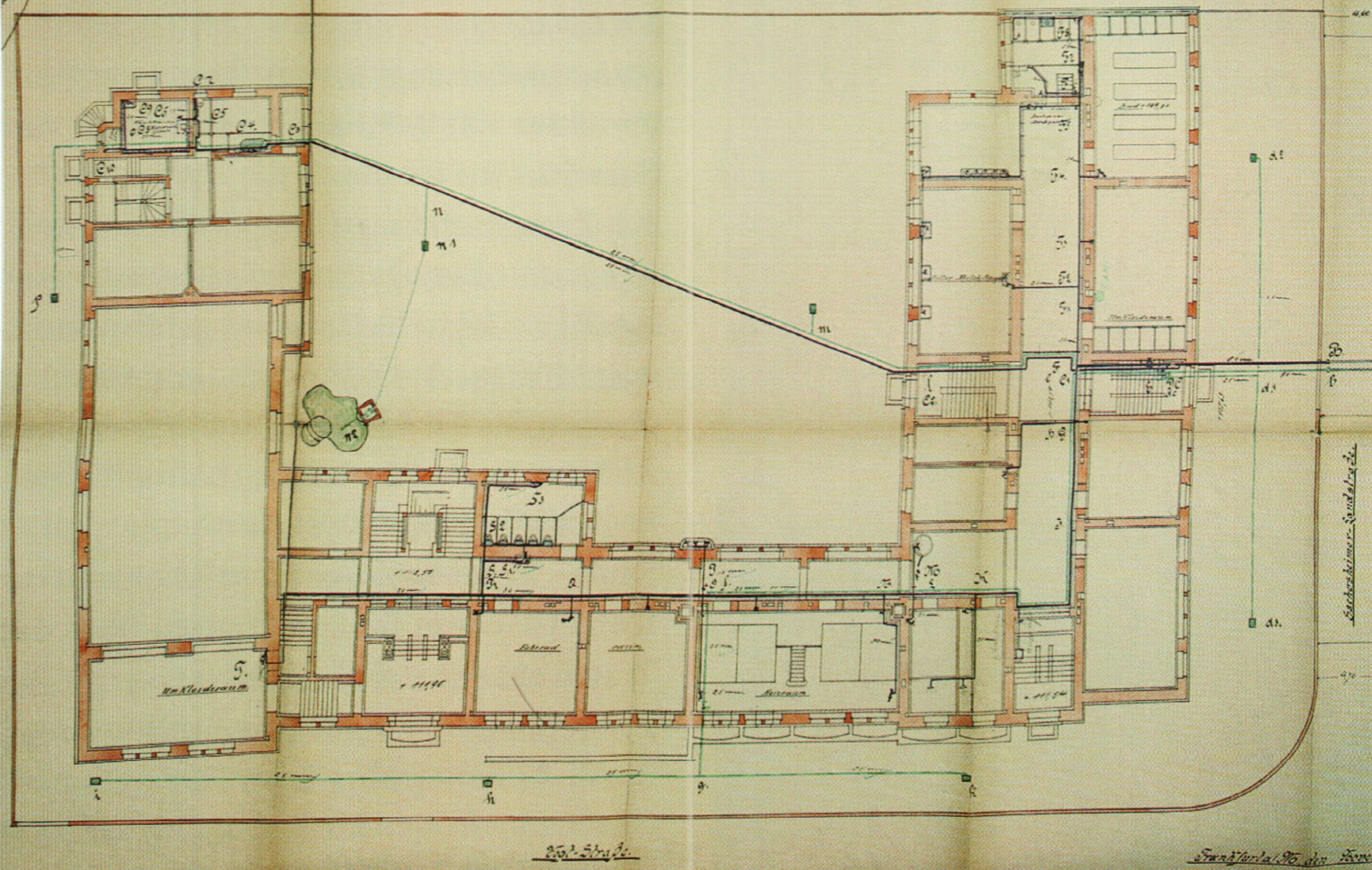 Frankfurt, Vogtstraße 33-37, Elisabethenschule, Bauplan.